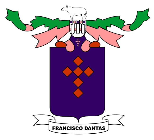 Brasão de Francisco Dantas, estado do Rio Grande do Norte, Brasil.